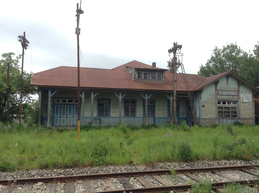 Estación Corte Alto del antiguo Ramal Corte Alto - Los Muermos